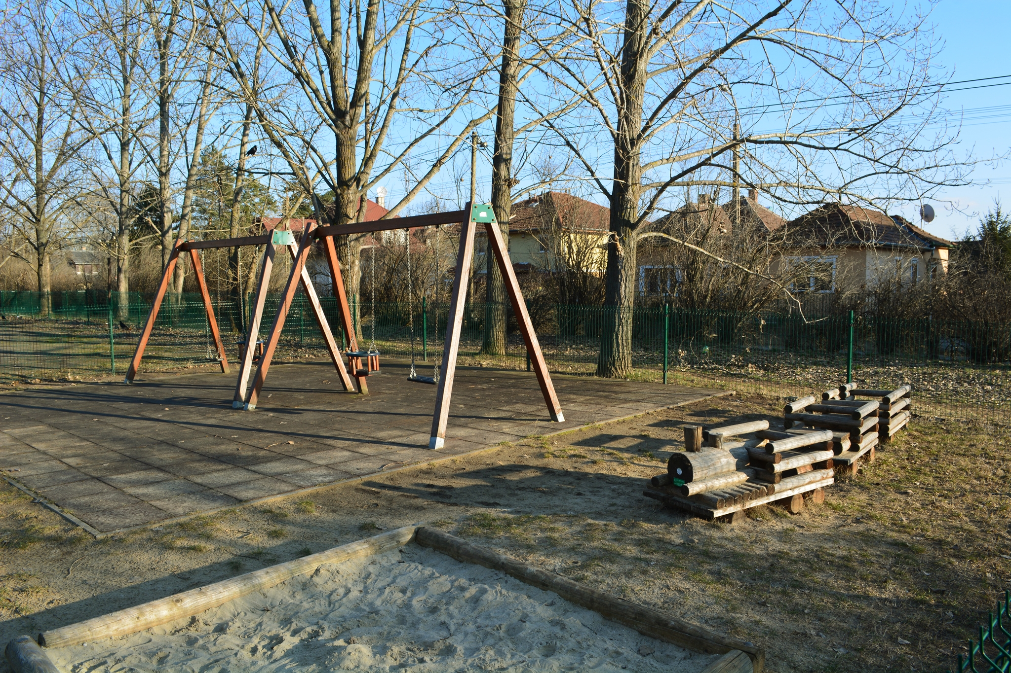 Részlet a Demjén-Diadal utca között található játszótérről.